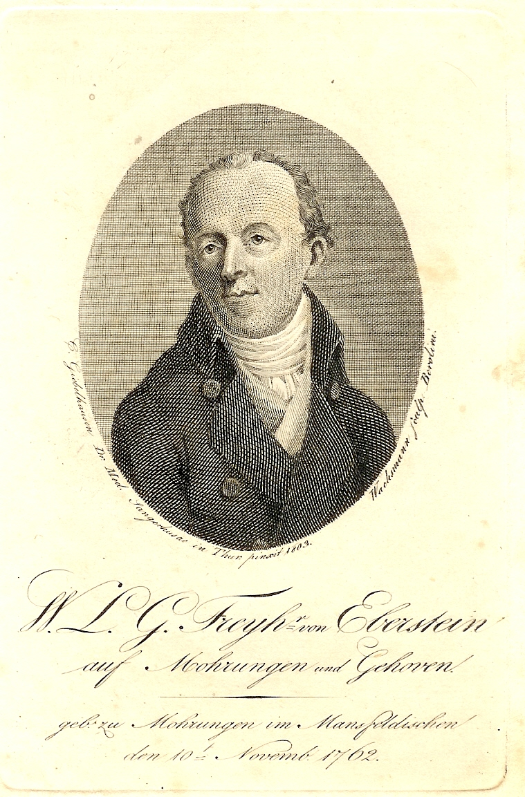 Kupferstich um 1800 von Wachsmann aus Berlin nach C. Gielhausen aus Sangerhausen